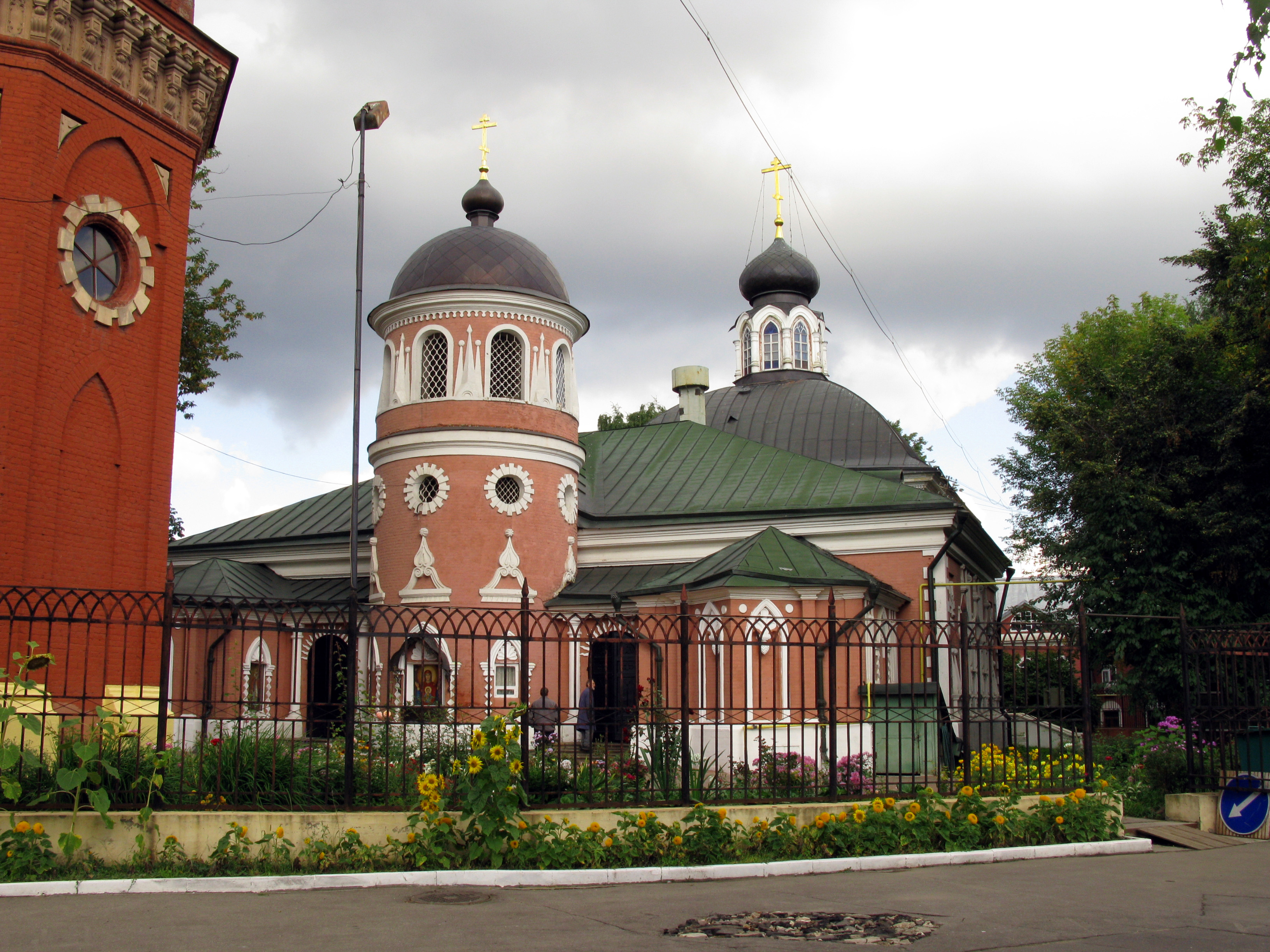 Церковь Николая Чудотворца (Успения Пресвятой Богородицы) на Преображенском кладбище